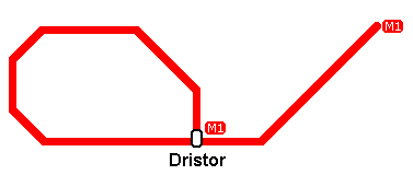 Bron: :Afbeelding:Kaart_metro_Boekarest.png